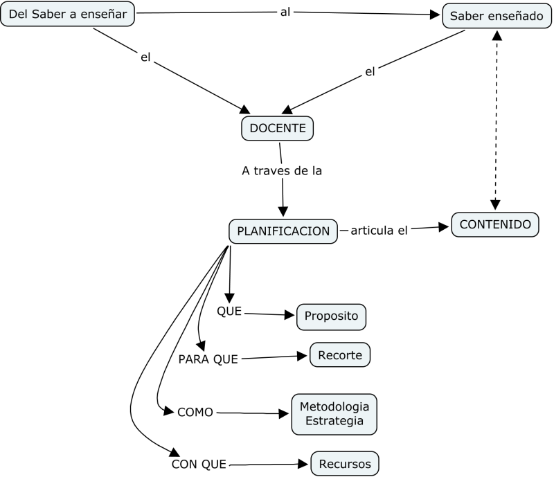 Desglose de docente-contenido-palnificación en clase de ciencias naturales 2